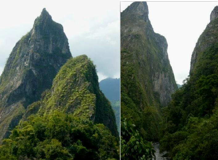 FURA Y TENA